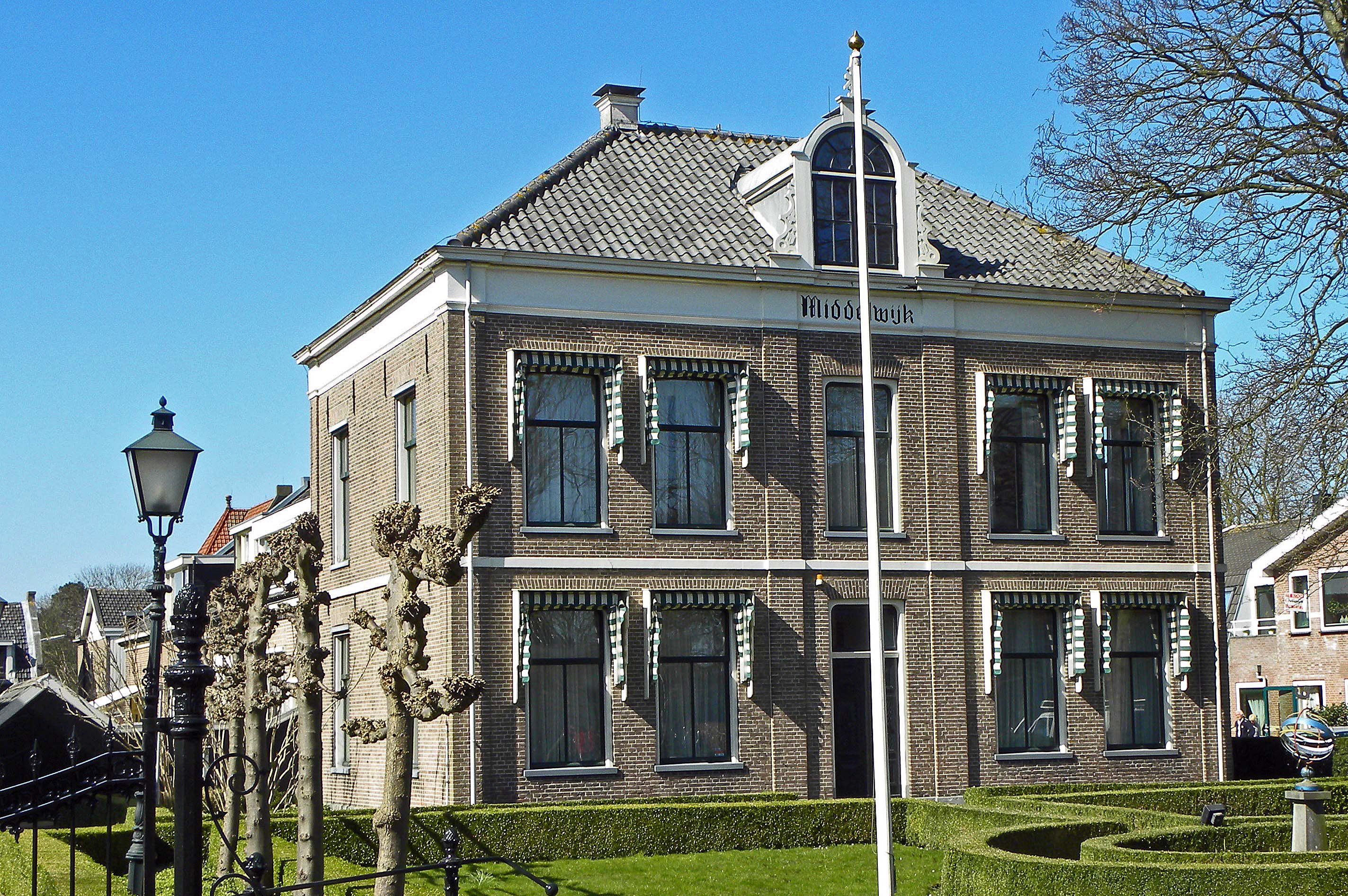 Villa "Middelwijck" Polderhuis